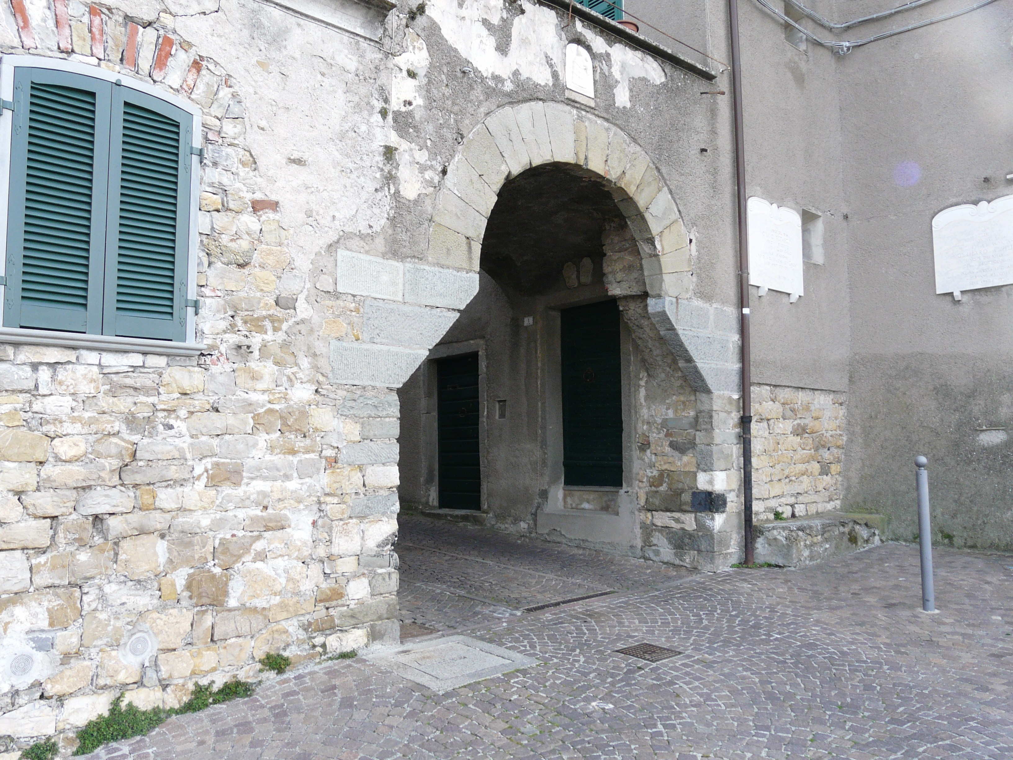 Bolano, Liguria, Italia